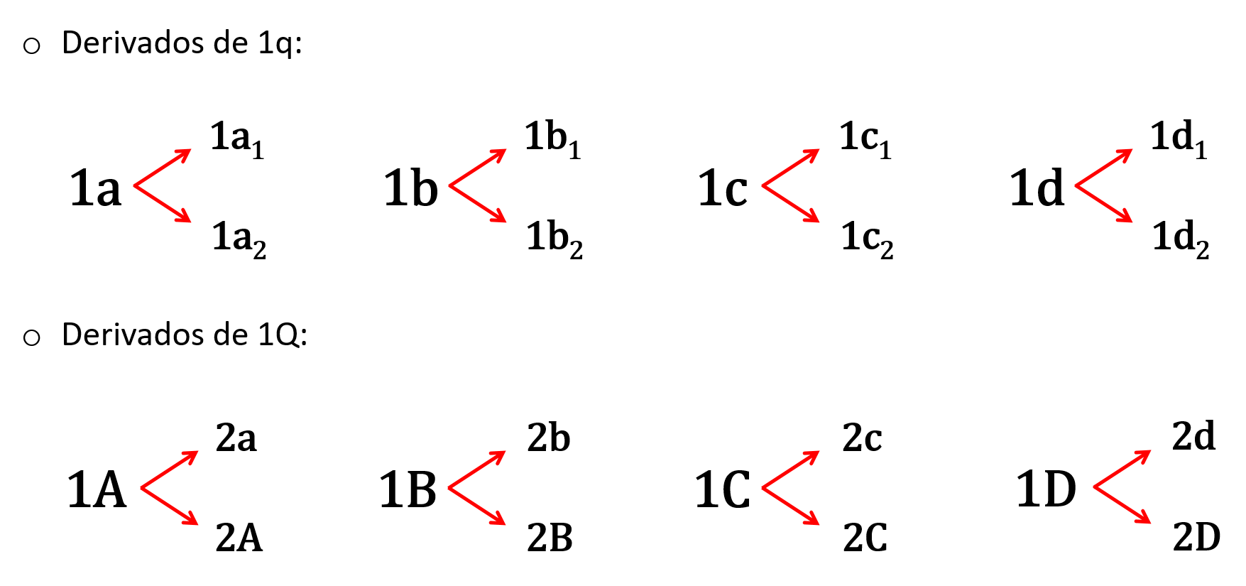 Derivados de 1q y 1Q